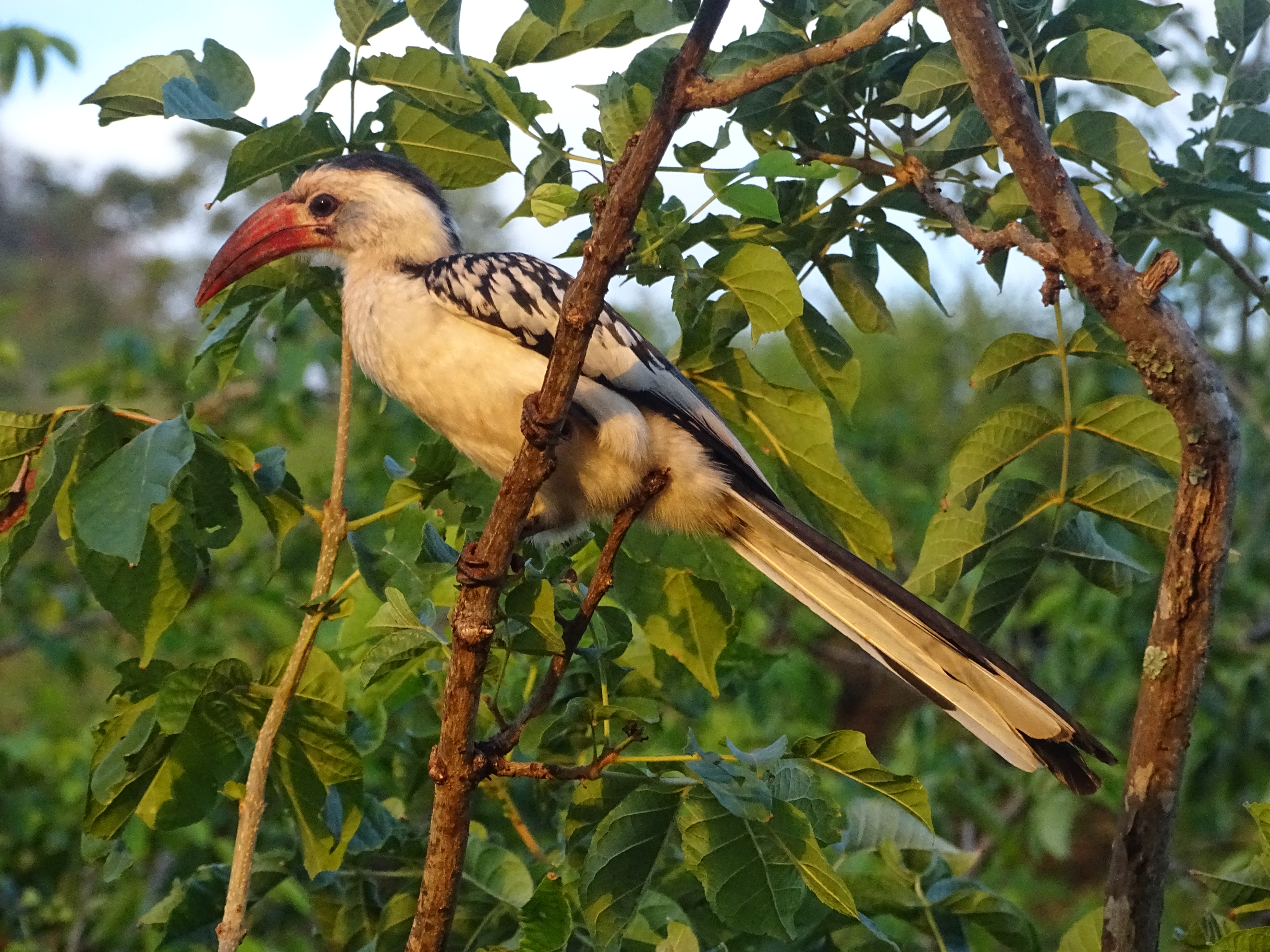 Calao à bec rouge, parc naturel du Tarangire, Tanzanie (mars 2017).